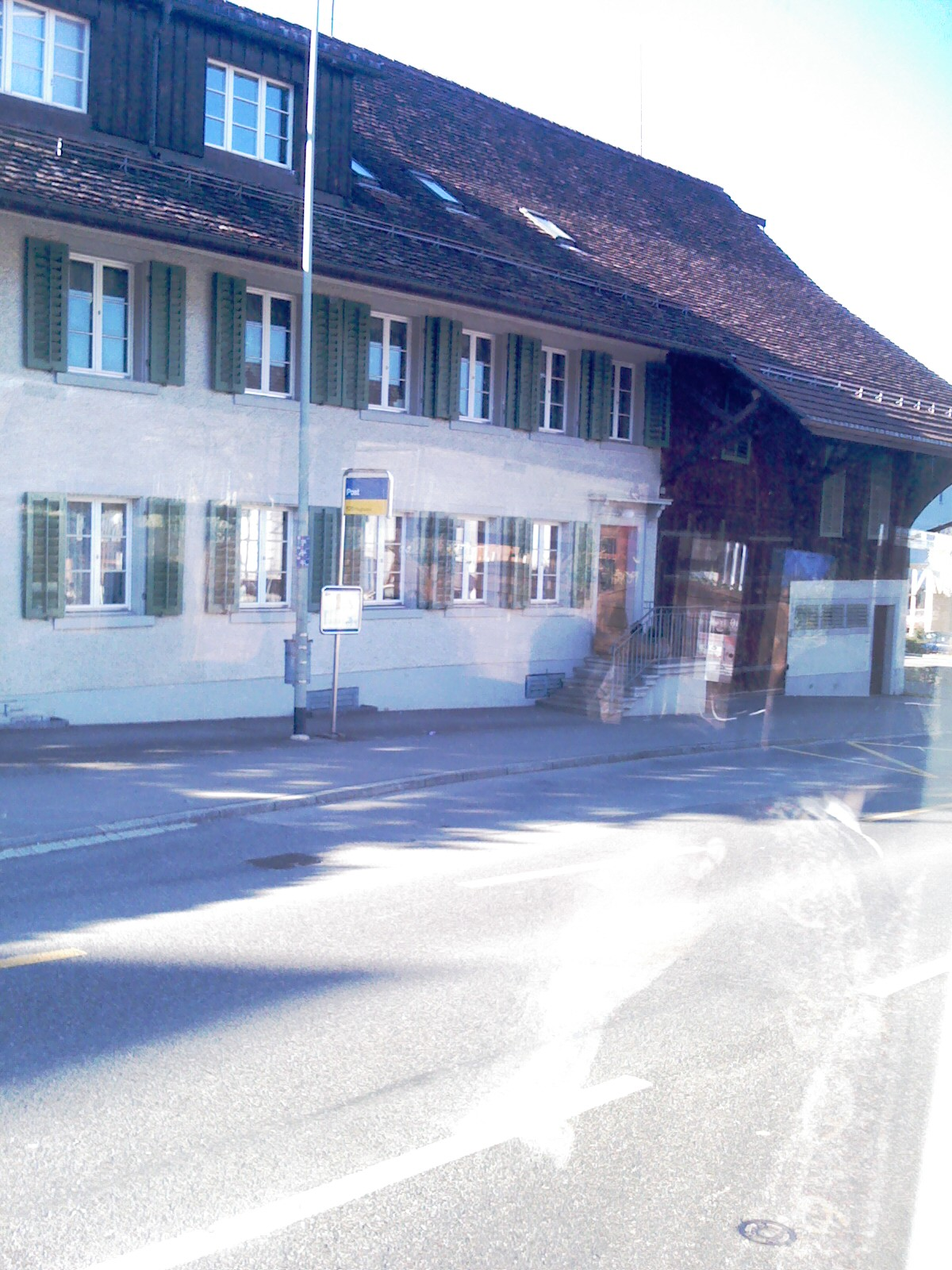 Lufingen Post Bus Stop - Lufingen Poŝtaŭto-Haltejo